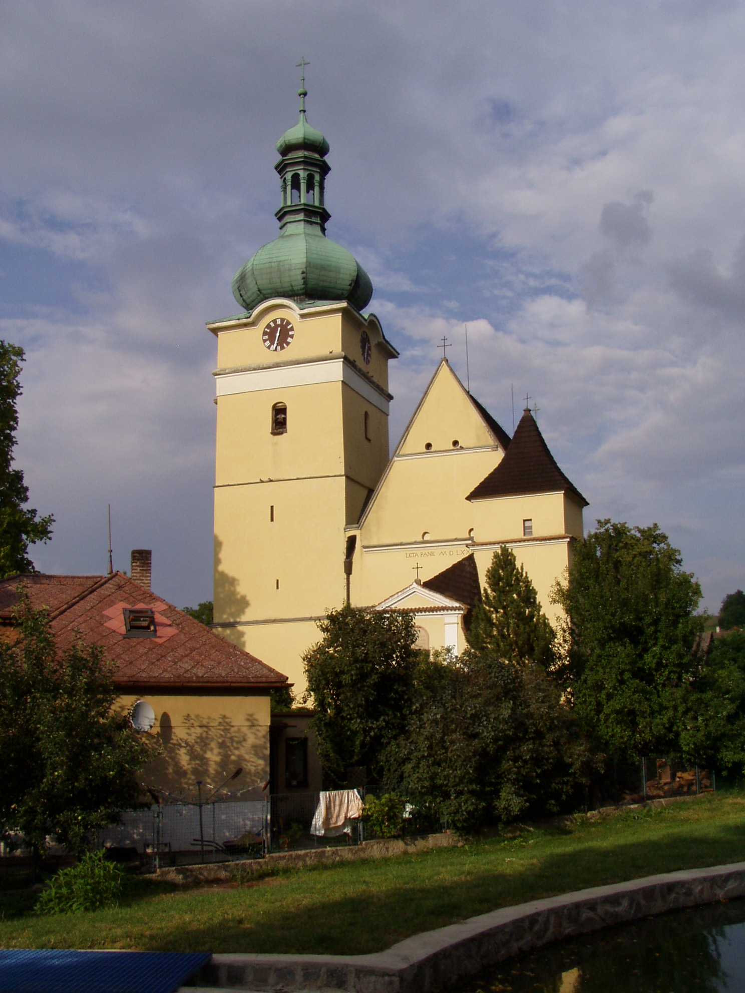 Kostel sv. Prokopa (Přepychyú